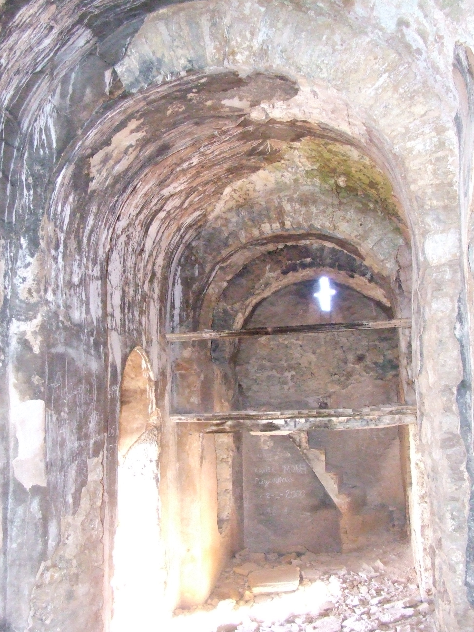 Església de Santa Anna de Montadó (Benavent de la Conca, Isona i Conca Dellà, Pallars Jussà)